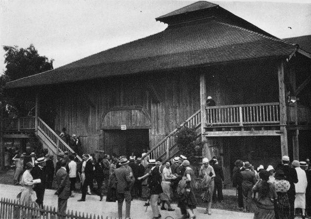 Le théâtre du Jorat à Mézières (Vaud) à l'issue d'une représentation du Roi David d'Arthur Honegger